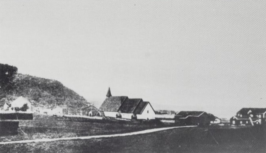 Ibestad gamle kirke, revet ca. 1880. Bilde gjengitt i «Jubileumsskrift for Ibestad kirkes 100-åras jubileum 1881–1981», s. 70.